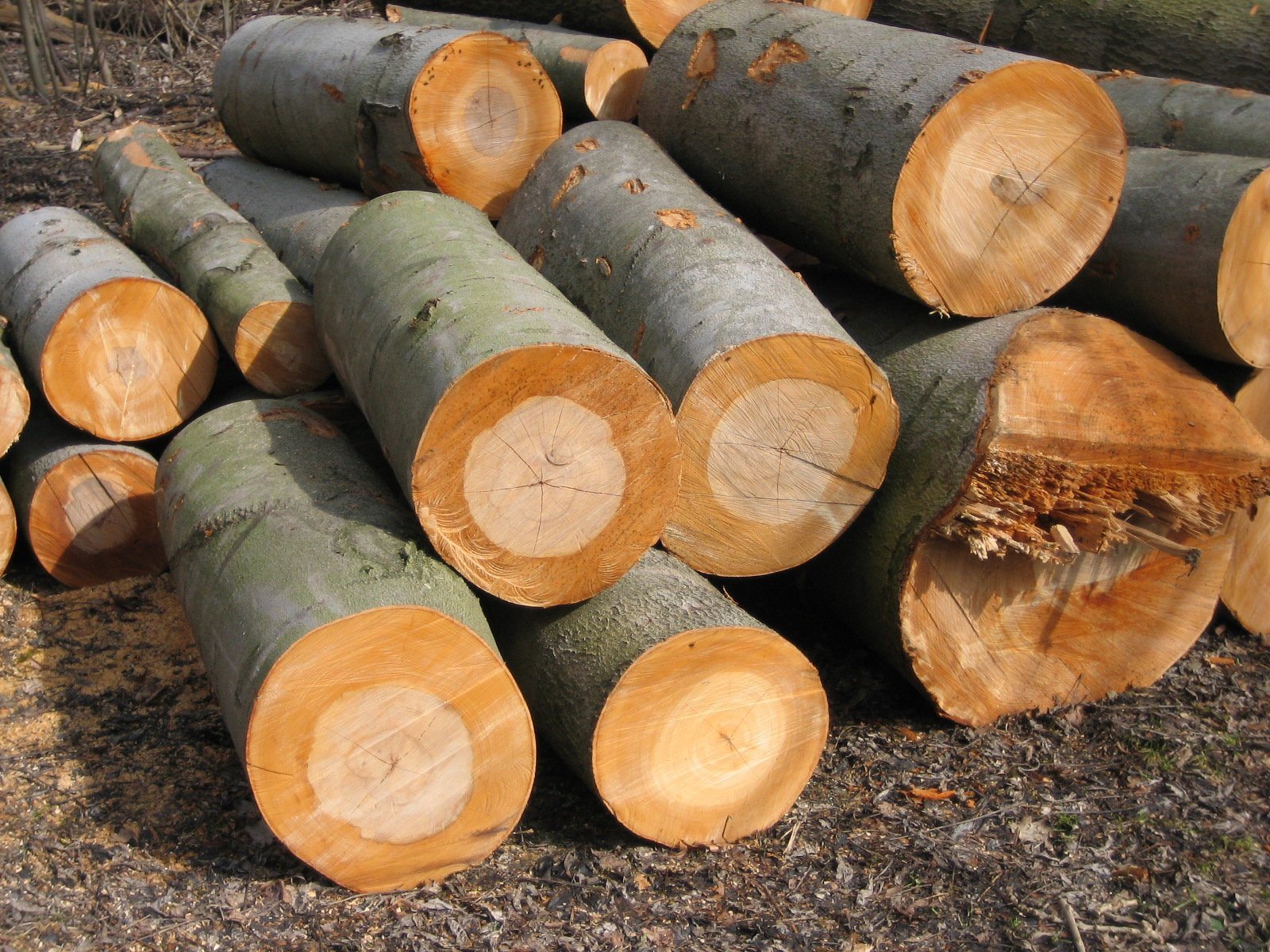 Eingeschlagenes Holz (Rotbuche) im Augsburger Siebentischwald